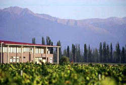 Fotografía de viñedo incluido en la página de la Bodega Tapiz . Los dueños de la Bodega han prestado su consentimiento para el uso de la misma.